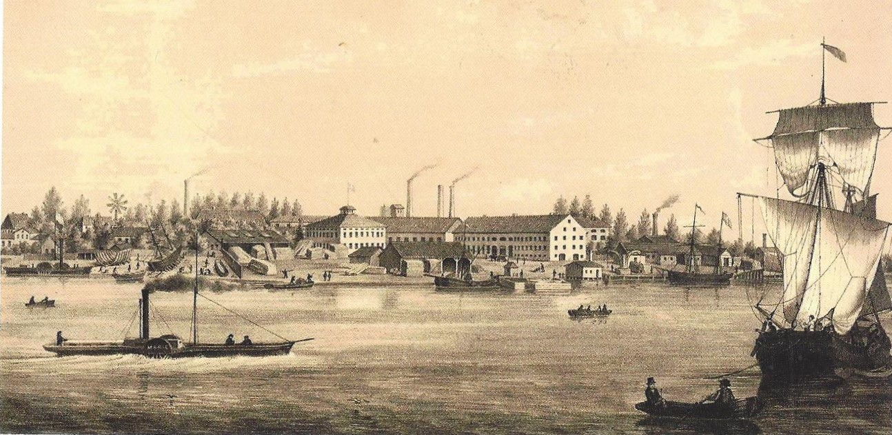 Lithographie der Carlshütte an der Obereider bei Rendsburg.